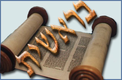 a tora icon